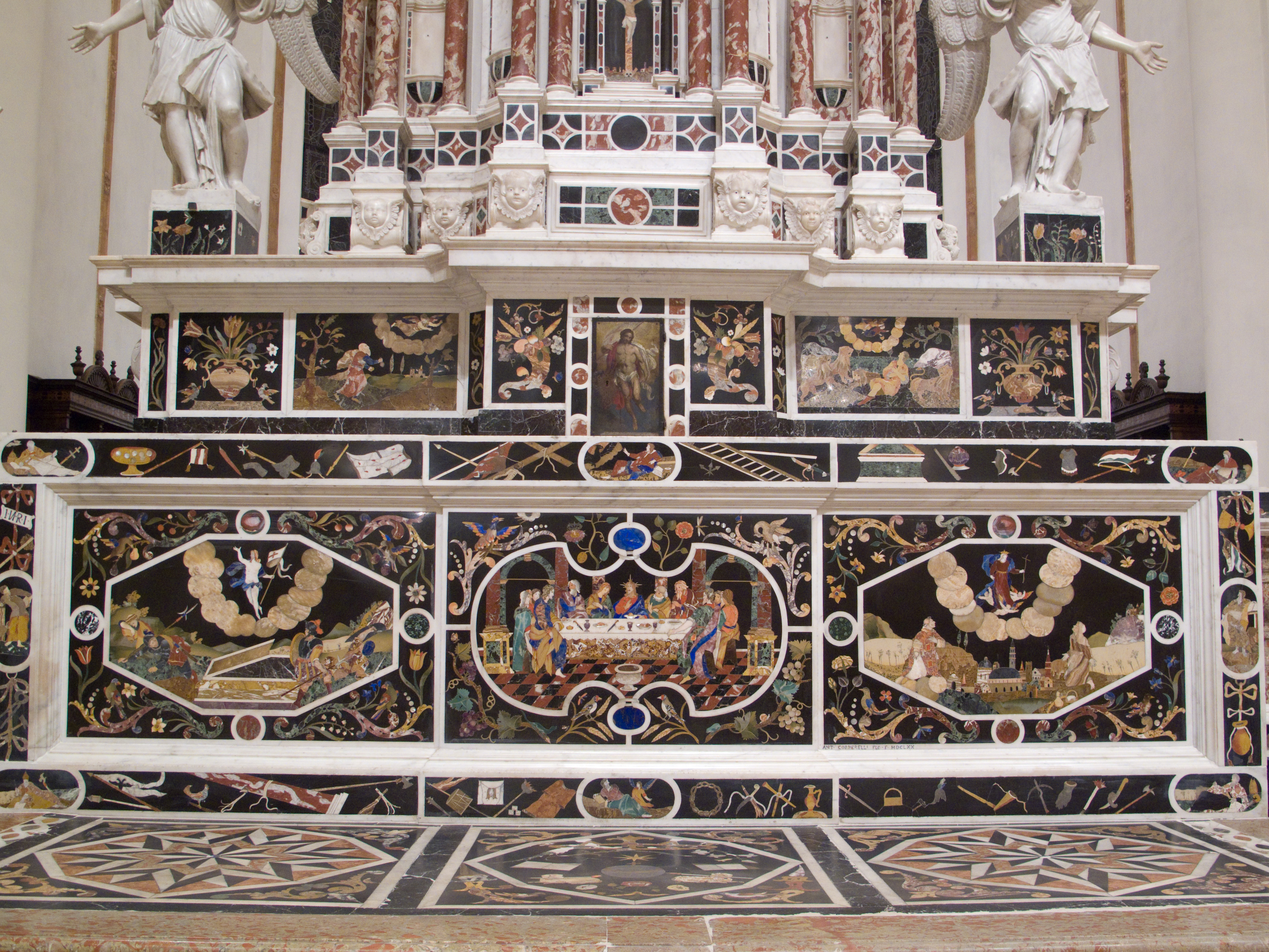 Vicenza - Chiesa di Santa Corona - Paliotto dell'altare centrale